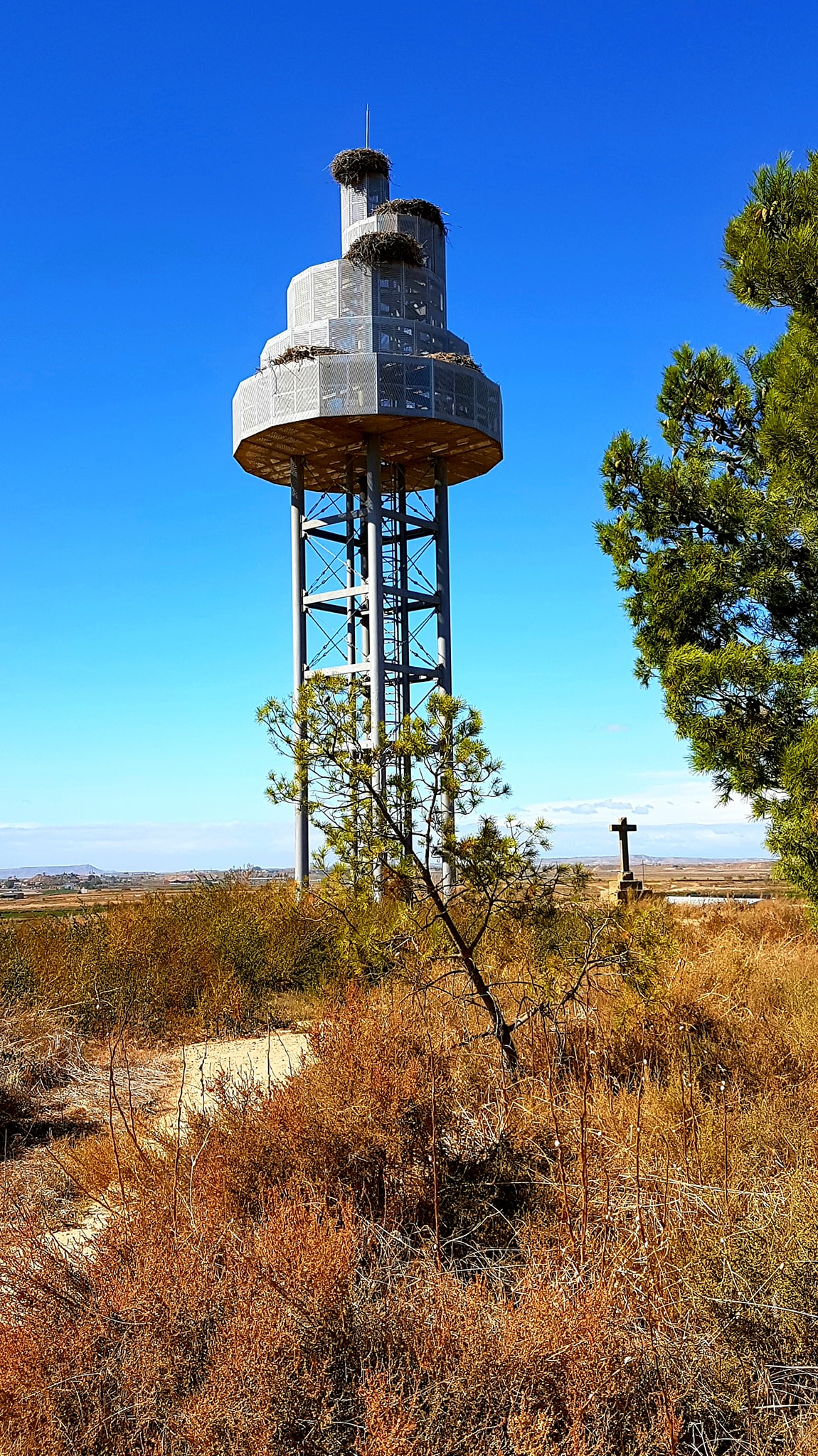 Aragonés: Torre metalica ta cubillar os niedos de cigüenya en a Cruceta (veyita a o fundo), Granyén.